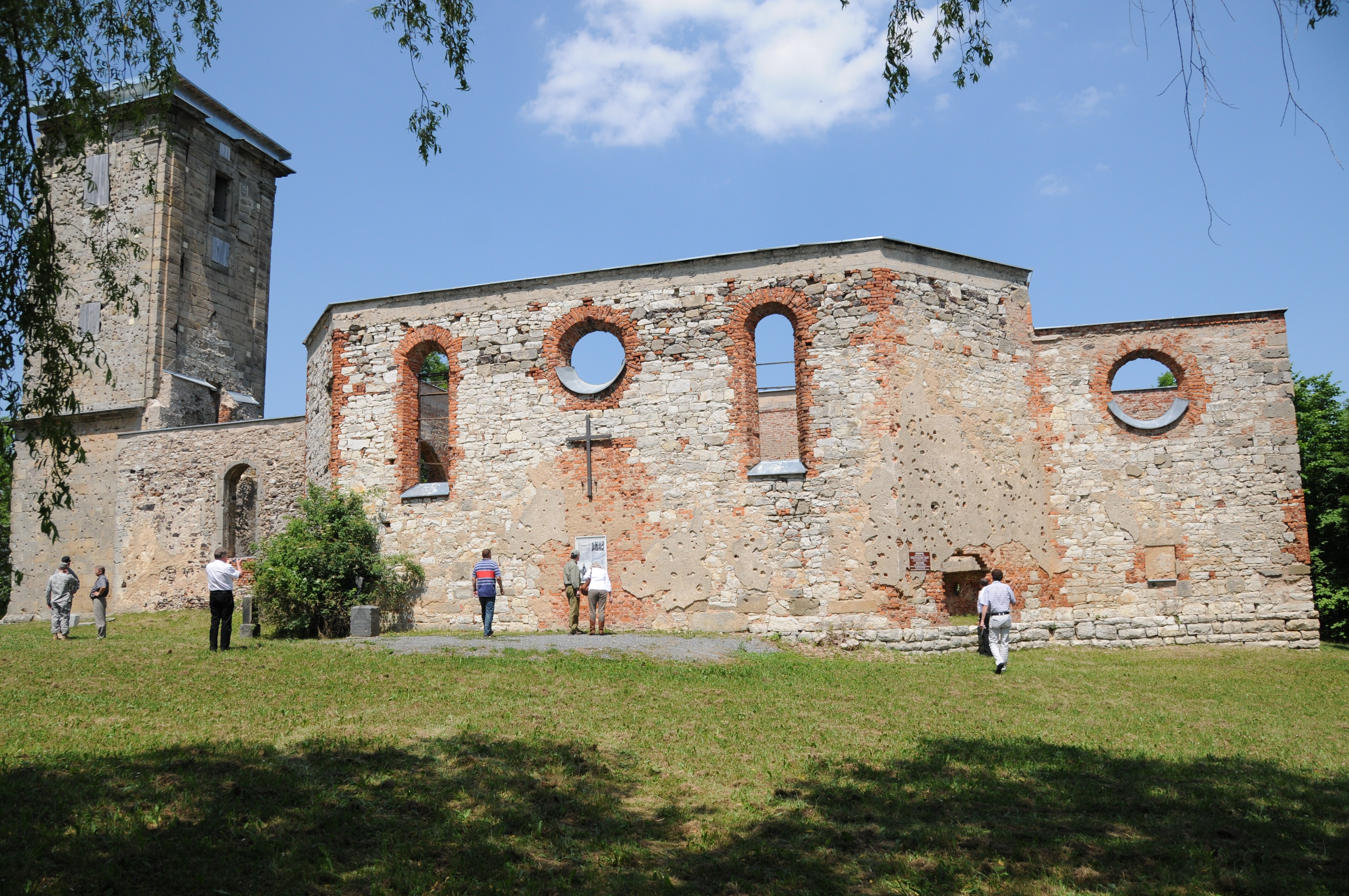 Photo - Pappenberg - Ruine der ehemaligen Pfarrkirche - 2020